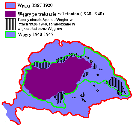 Hungarians in Yugoslavia, Slovakia and Romania/ Węgrzy w Jugosławii, Słowacji i Rumunii w latach 1920-1940